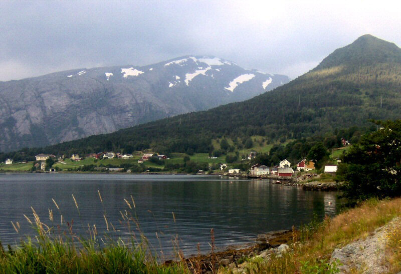 Copyright (c) 2005 RANDI TVEIT SOLHEIM.